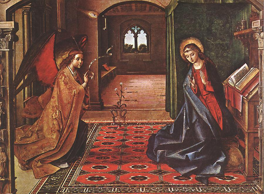 La obra representa el momento en que el arcángel San Gabriel anunció a la Virgen María que sería la madre del Mesías prometido por Dios al pueblo judío, Jesucristo.